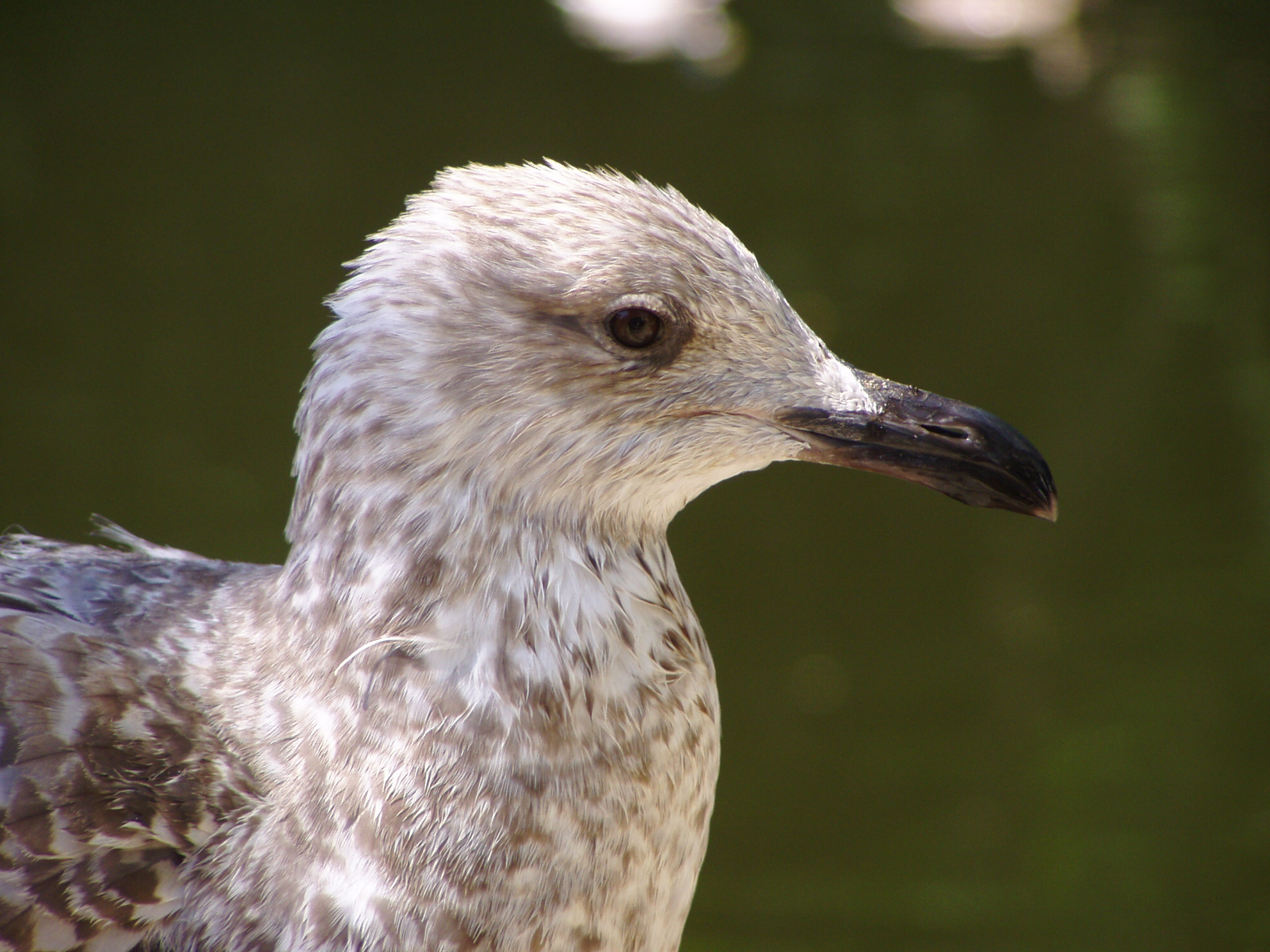 Yellow-legged Gull Larus michahellis, juvenile.